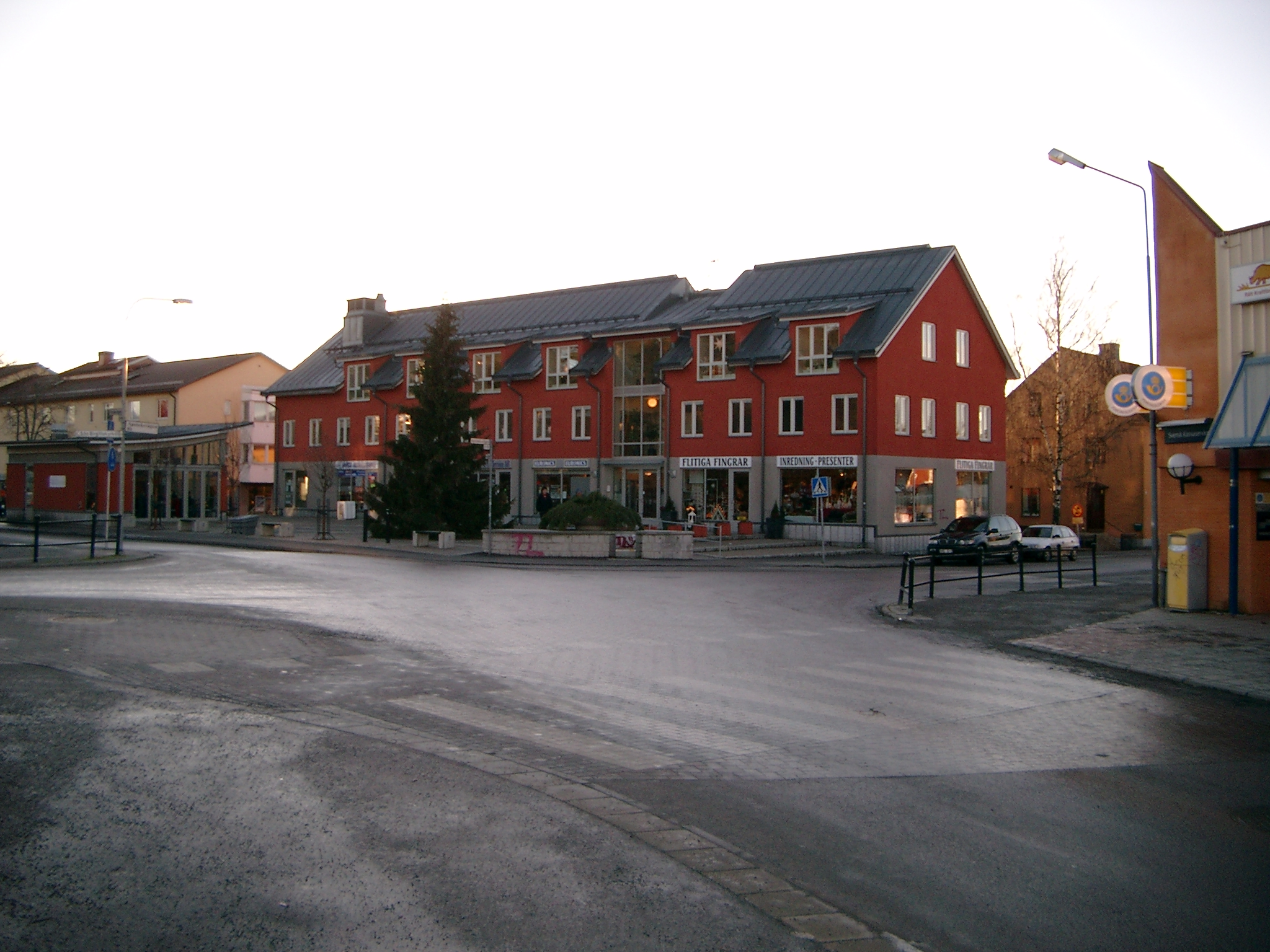 Knivsta centrum